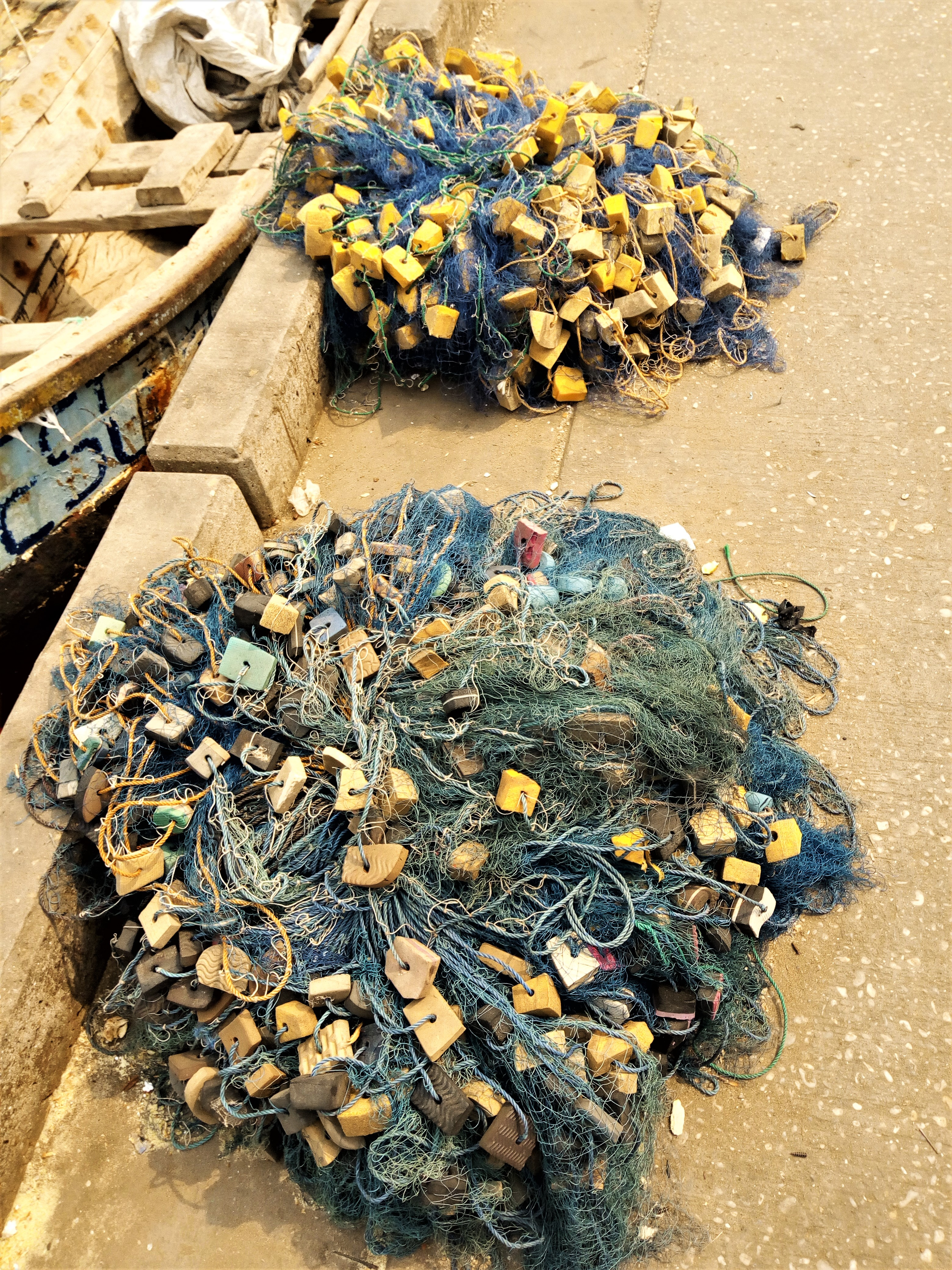 Filets flottants de pêche au port de pêche de Cotonou au Bénin This is an image with the theme "Africa on the Move or Transport" from: Benin